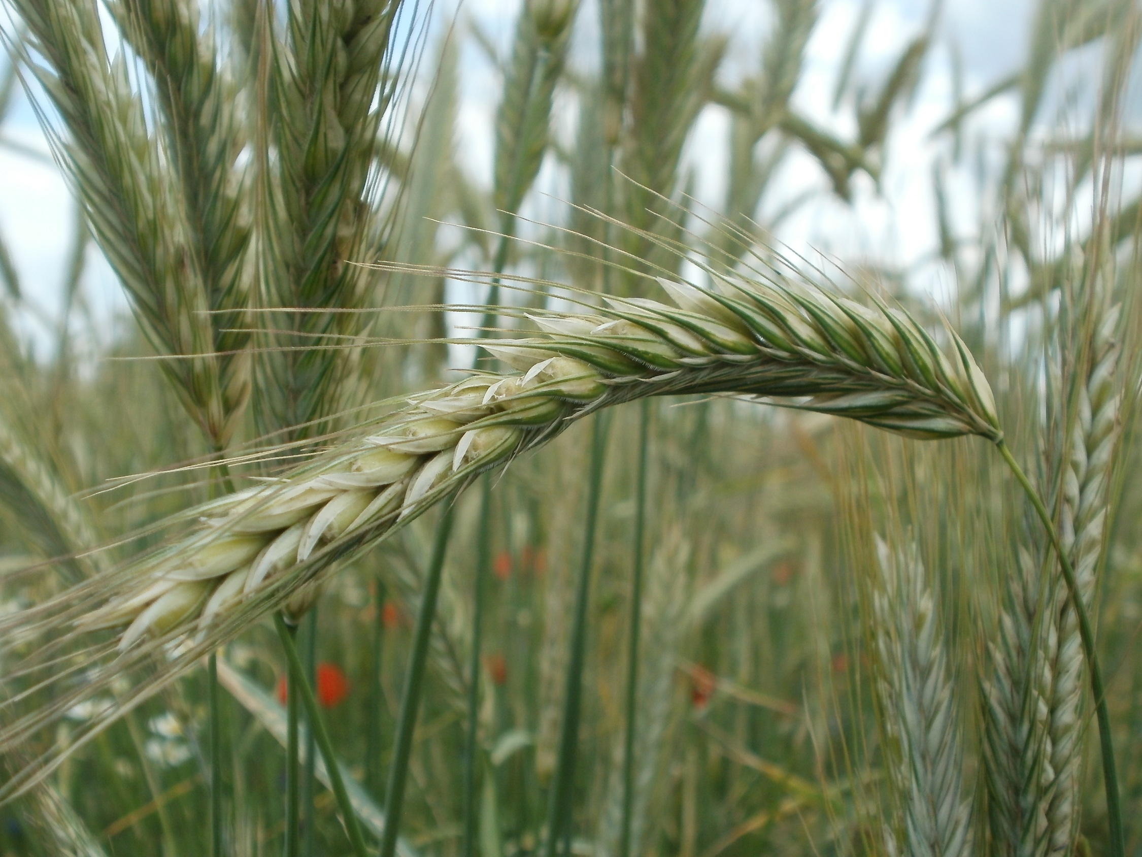 Roggenfeld bei Reilingen